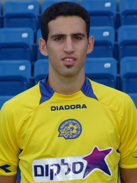 יובל שפונגין, שחקן מכבי תל אביב (Yuval Shpungin of Maccabi Tel Aviv)